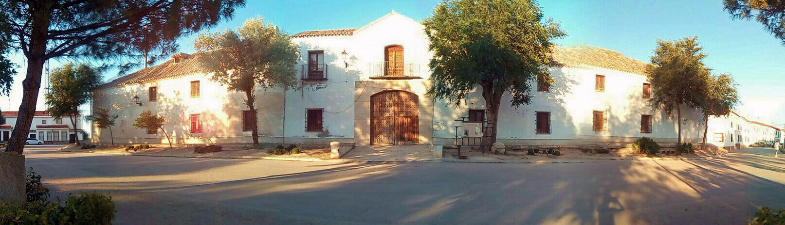 Casa de Postas de Tembleque - Panoramique